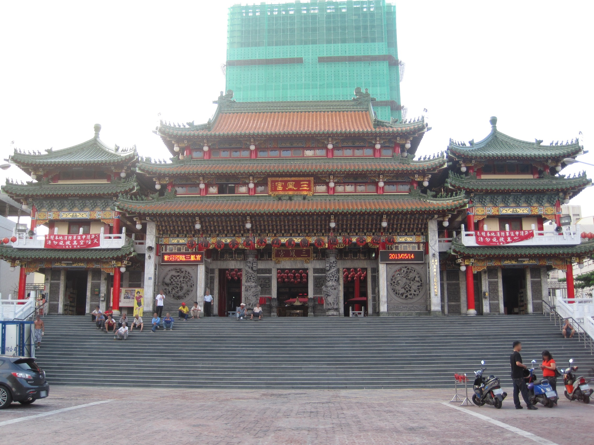 高雄市三民區三鳳宮。